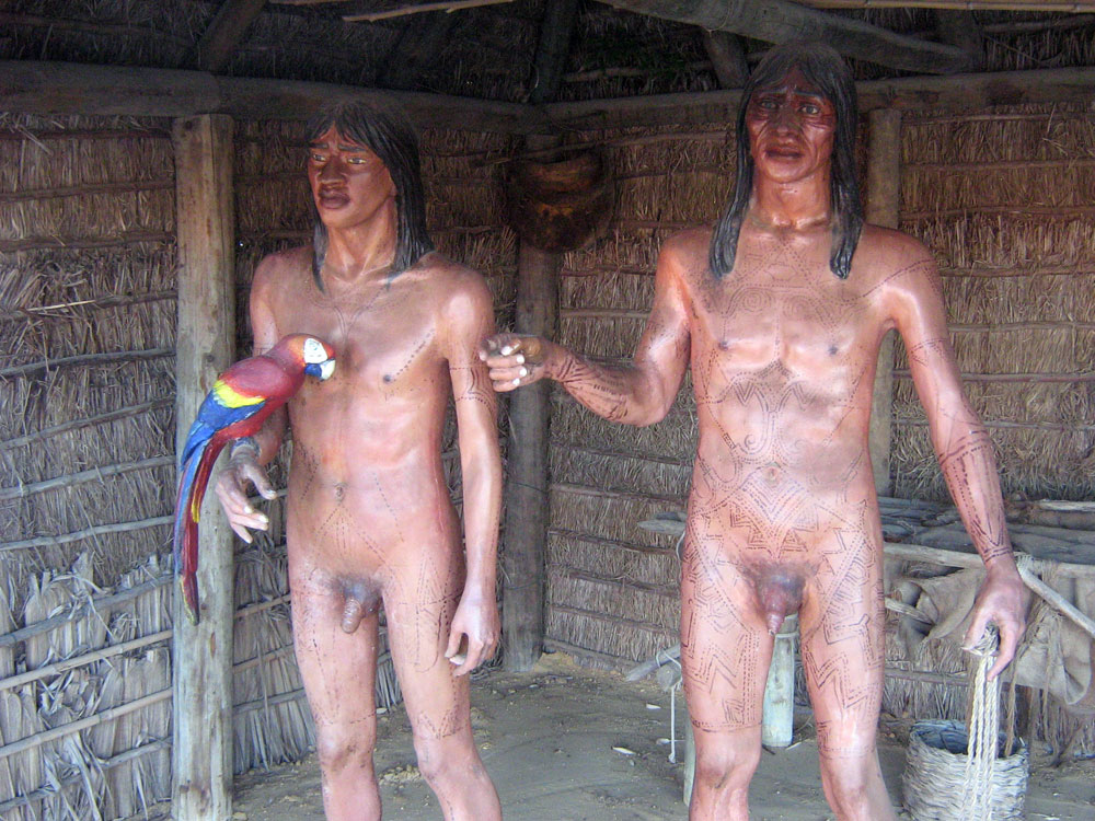 Indígenas americanos en El Muelle de las Carabelas, representando la visión que tuvieron los miembros del primer viaje colombino al llegar al nuevo continente.